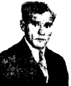 תעודת התאזרחותו של שמואל הורביץ בזמן המנדט הבריטי בארץ ישראל